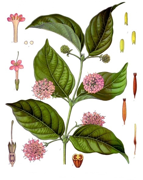 Gambir. A blühender Zweig, natürl. Grösse; 1 einzelne Blüthe, vergrössert; 2 Blumenkrone aufgeschnitten und auseinandergelegt, desgl.; 3 Staubgefässe von verschiedenen Seiten, desgl.; 4 Pollen, desgl.; 5 Blüthe ohne Krone im Längsschnitt, desgl.; 6 Kapselfrucht, natürl. Grösse; 7 dieselbe halbirt, desgl.; 8 Same, vergrössert; 9 Kapsel im Querschnitt, desgl.